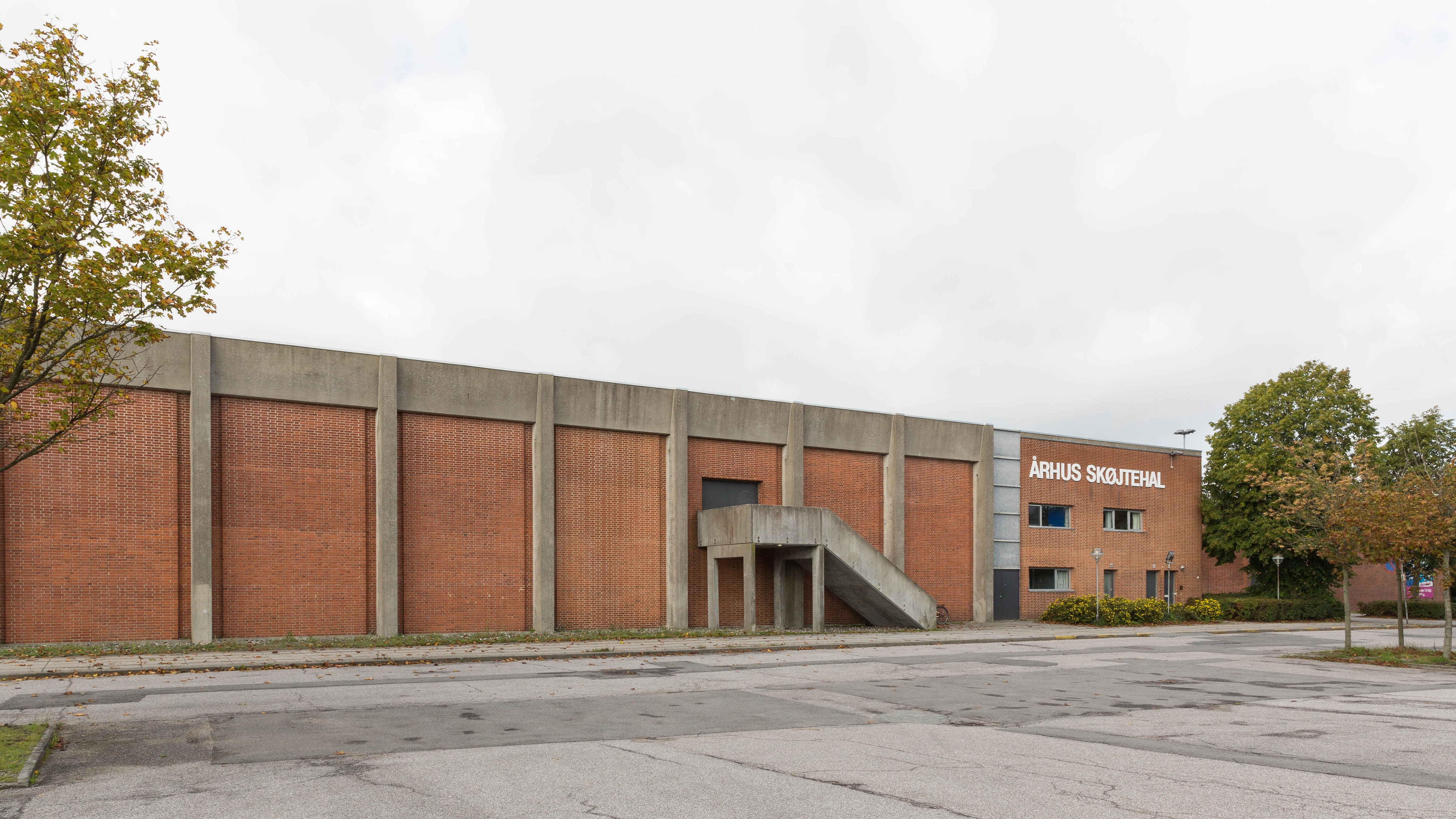 Aarhus Skjøtehal